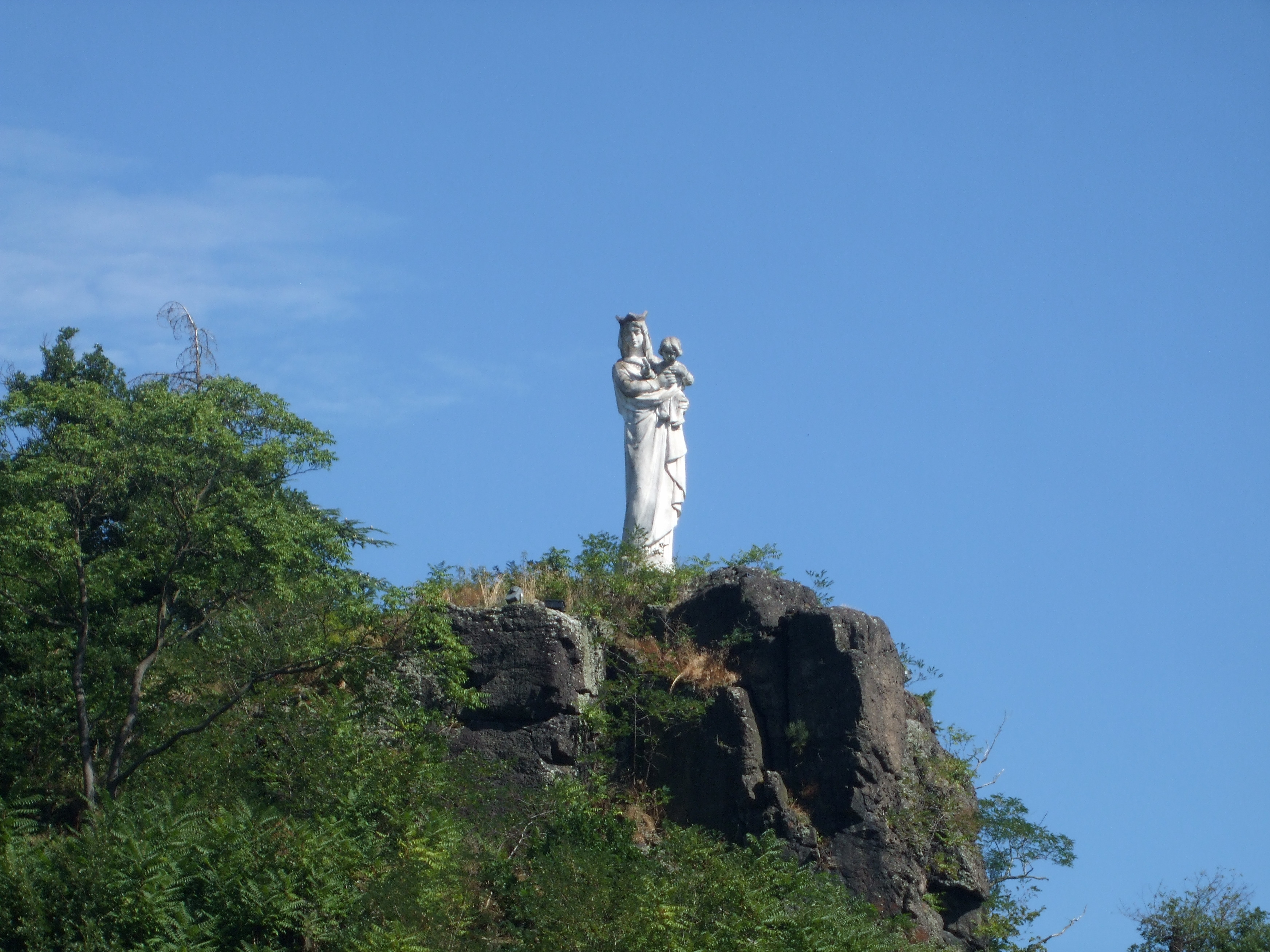 Madone (Vierge à l'enfant) d'Annonay (Ardèche)